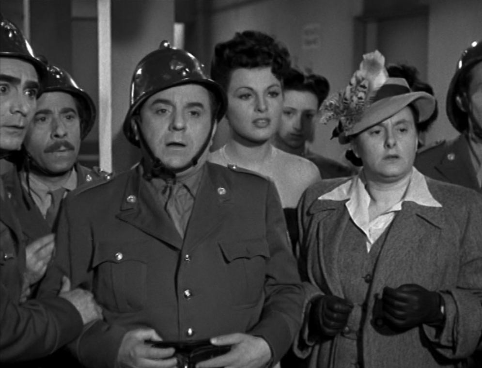 Screenshot from I pompieri di Viggiù (1949)